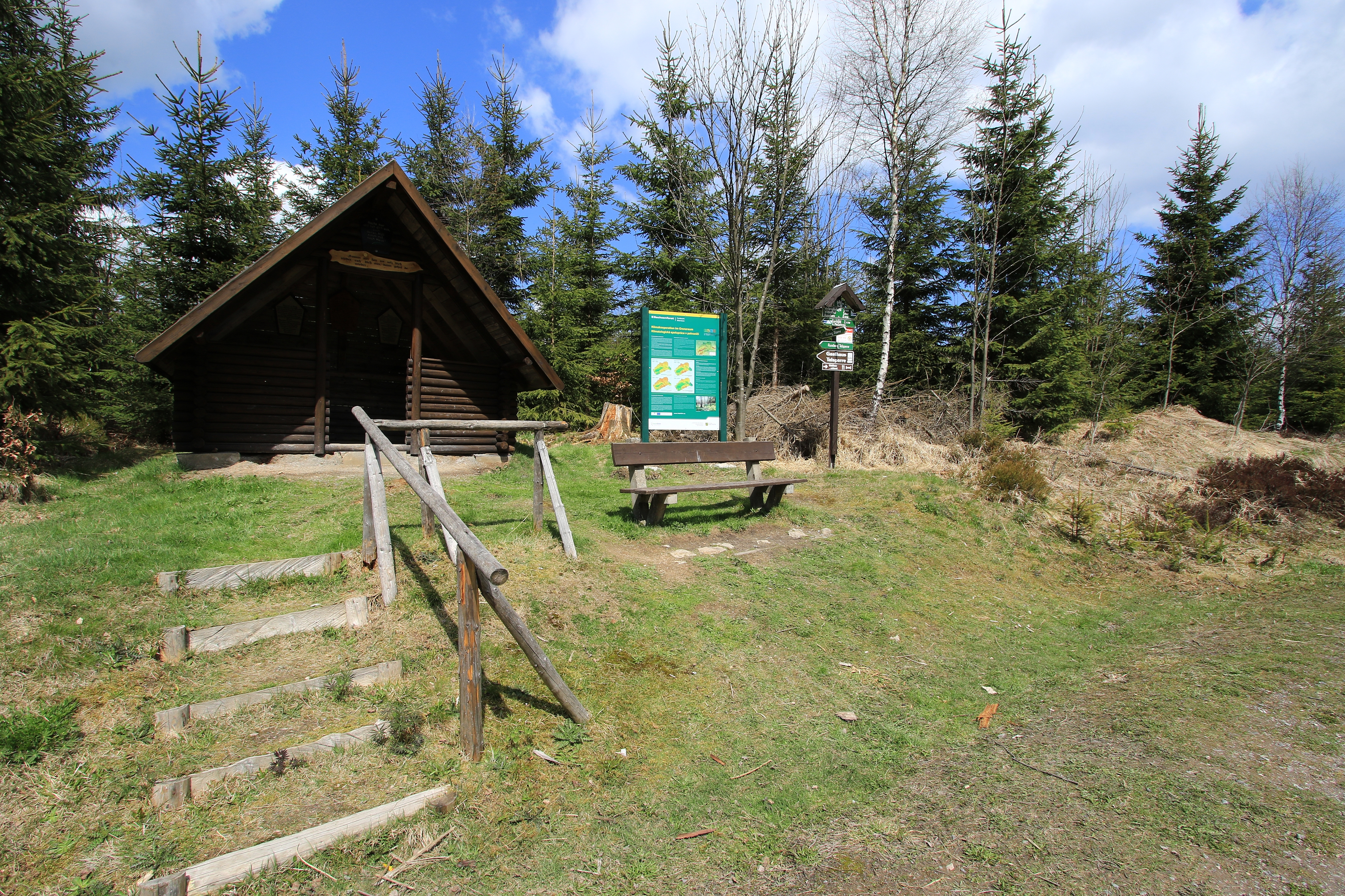 Naturschutzgebiet "Großer Kranichsee" bei Carlsfeld in Sachsen..